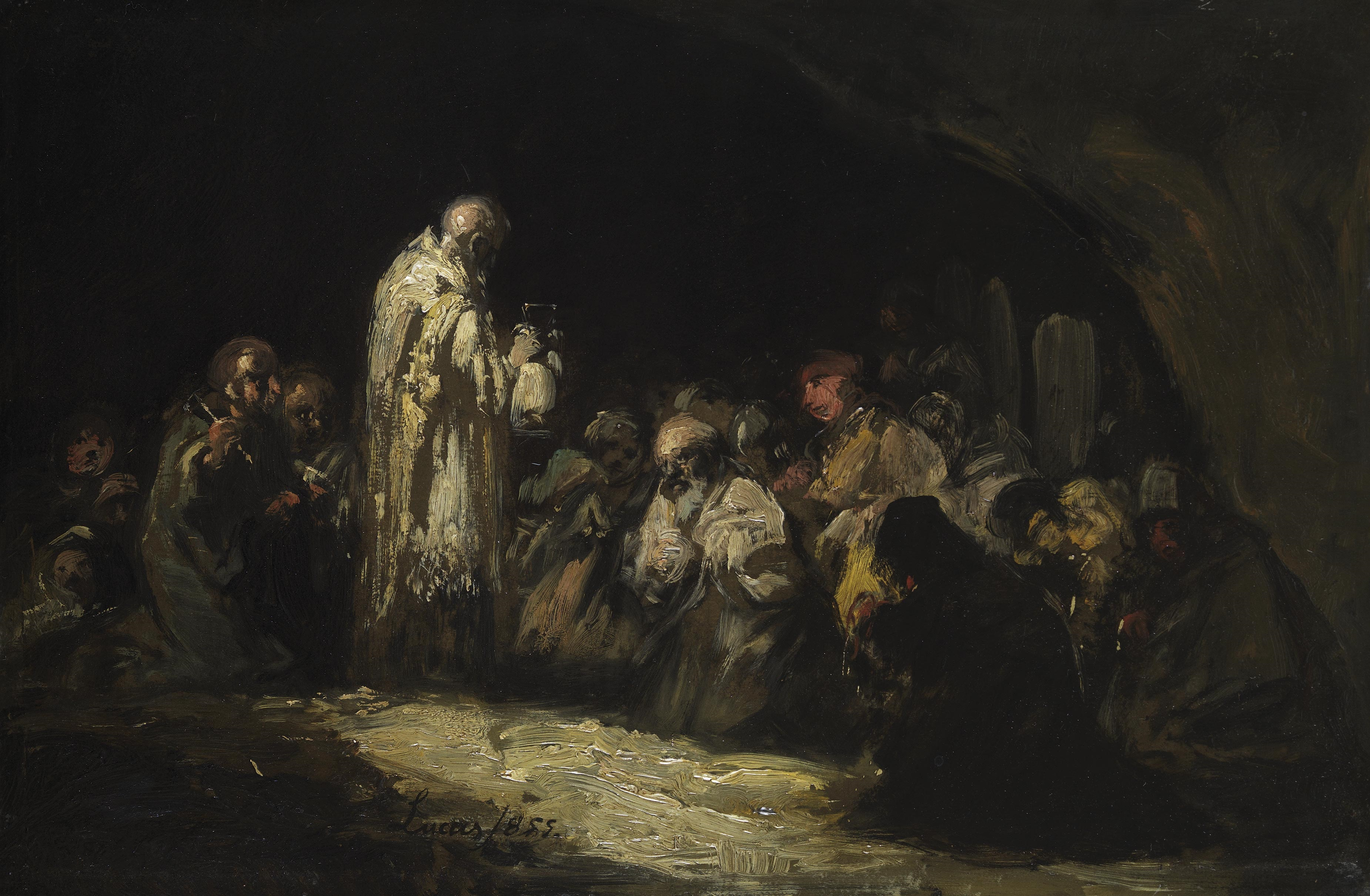 El lienzo muestra a un sacerdote repartiendo la Comunión entre un grupo de cristianos.